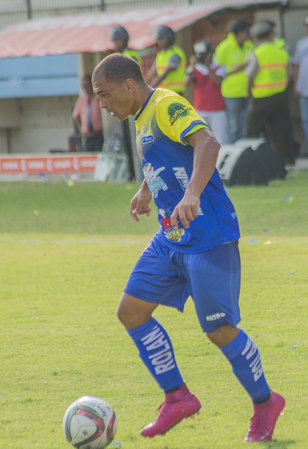 Janderson Pereira en Delfín Sporting Club 2015